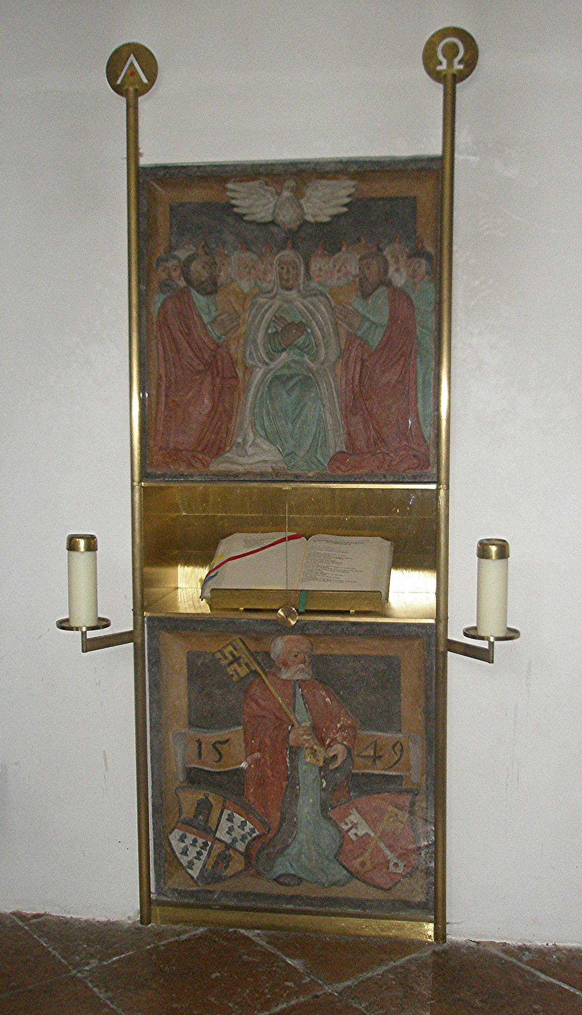 Der „stelenartige Wandschrein“ an der rechten Langhauswand der Stiftskirche Berchtesgaden wurde 1998 aus zwei von drei Mitte der 1960er im Boden gefundenen Platten aus dem Jahr 1549 gebildet, die zuvor am Volksaltar angebracht worden waren.